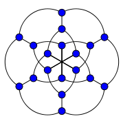 Назван в честь Папп Александрийский Вершин 18 Рёбер 27 Радиус 4 Диаметр 4 Обхват 6 Автоморфизмы 216 Хроматическое число 2 Хроматический индекс 3 Свойства двудольный симметричный кубический гамильтонов дистанционно-транзитивен дистанционно-регулярен